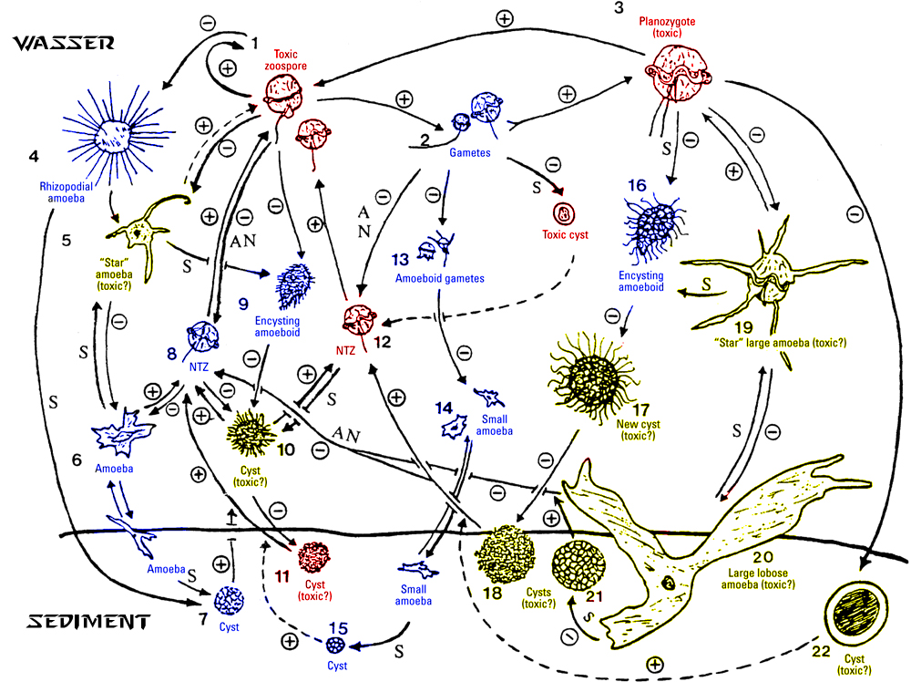 Diagram of Pfiesteria lifecycle. ; original comment: Dieses bild beschreibt den Lebenszyklus der Pfiesteria das Bild liegt auf meiner Homepage sieh oben.